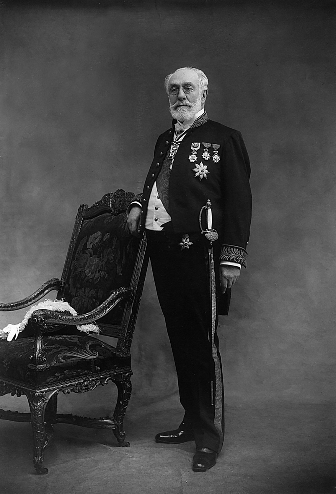 Édouard Otlet en 1887. Il a reçu l'ordre de Léopold.